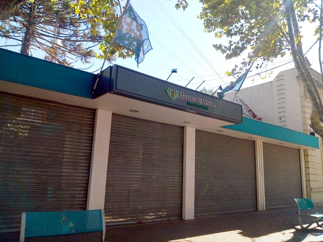 Municipalidad Florencio Varela